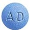 Blaue Adderall-Tablette, enthält 10 mg Amphetamin